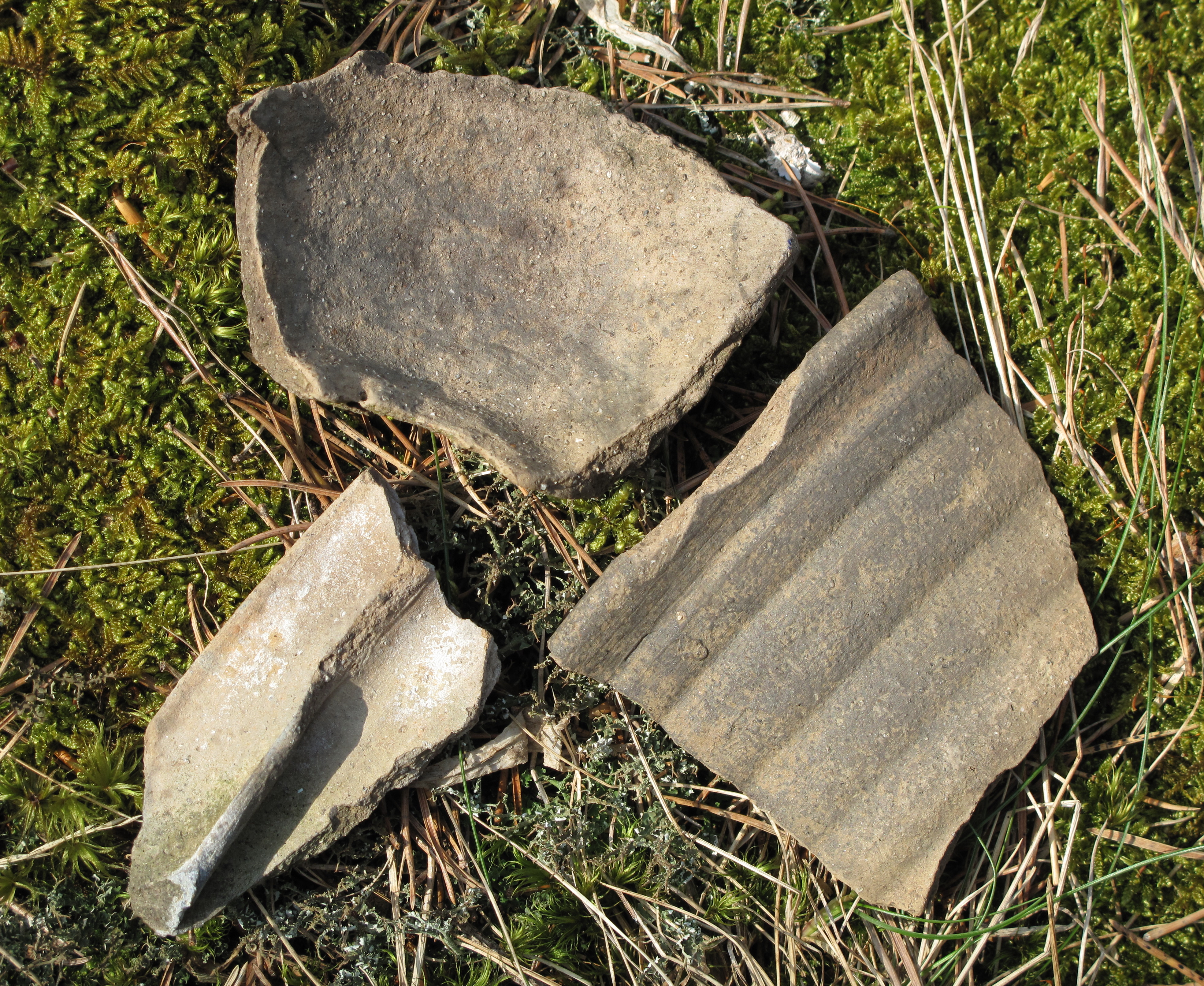 Lesekeramikfunde (Becherscherbe und Ofenkachelfragmente) aus den unteren und mittleren Ruinenbereichen.